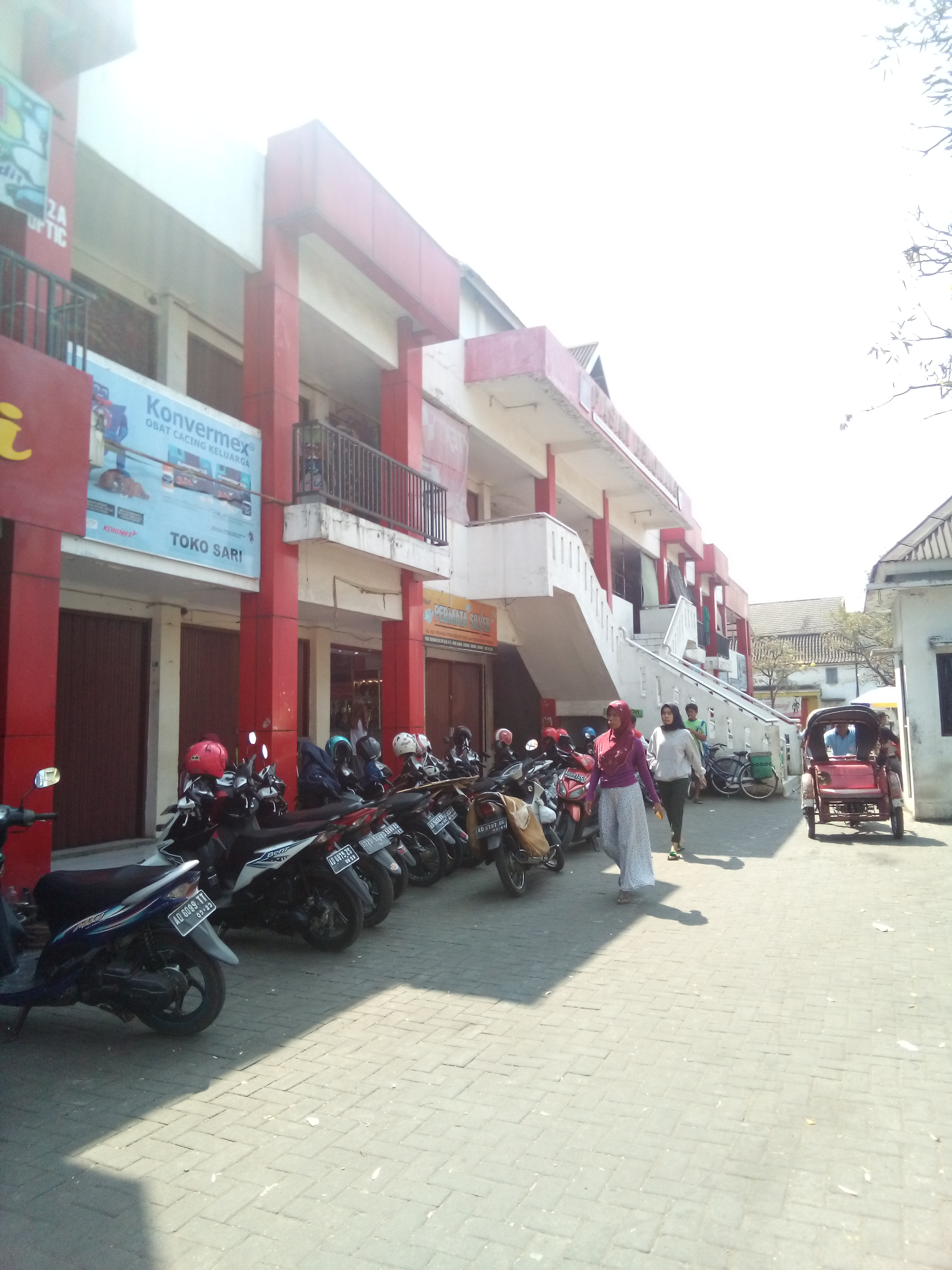 Jawa: Pasar